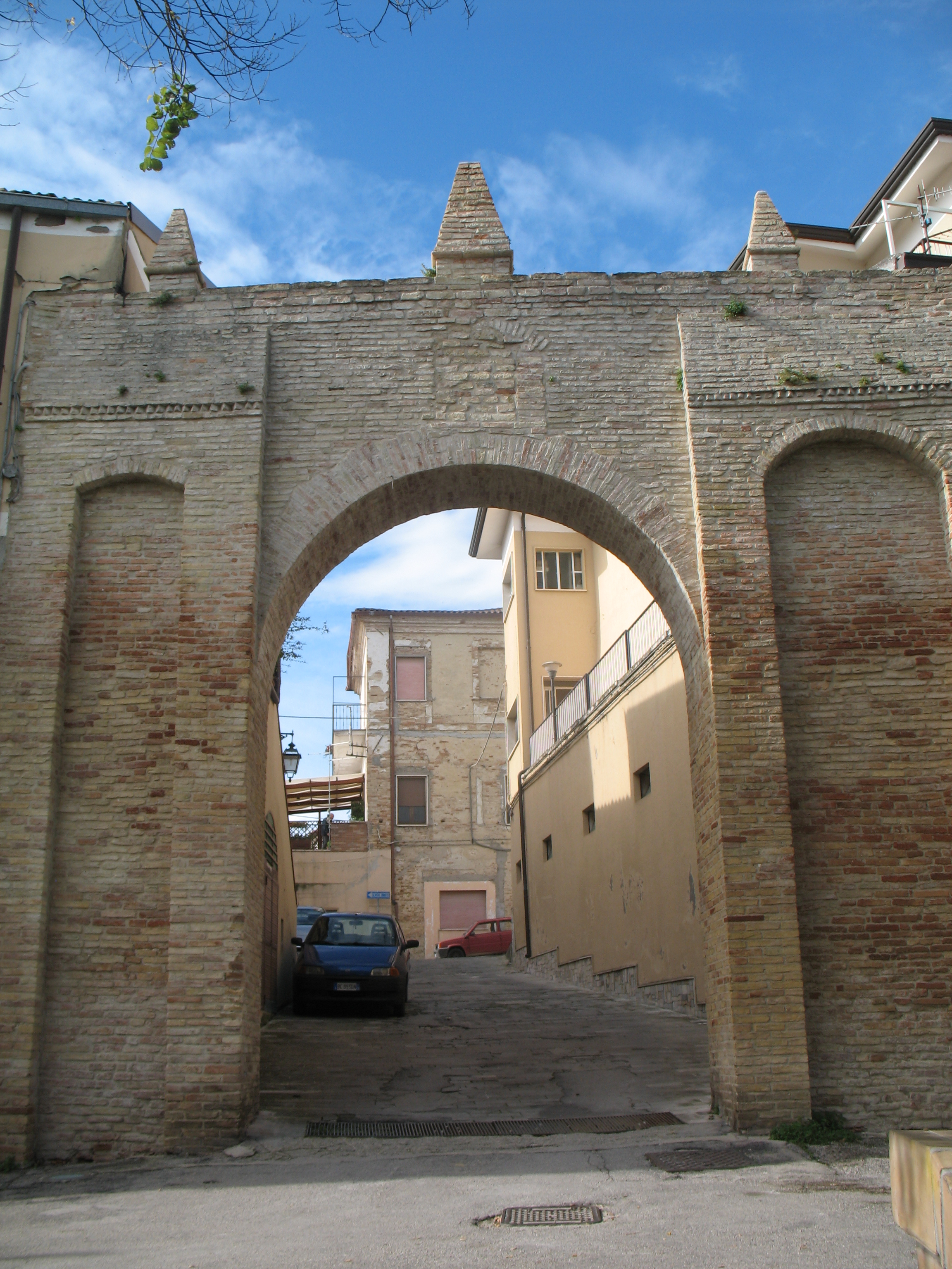 Questo ingresso di origine medievale fa parte del complesso conventuale di San Francesco.